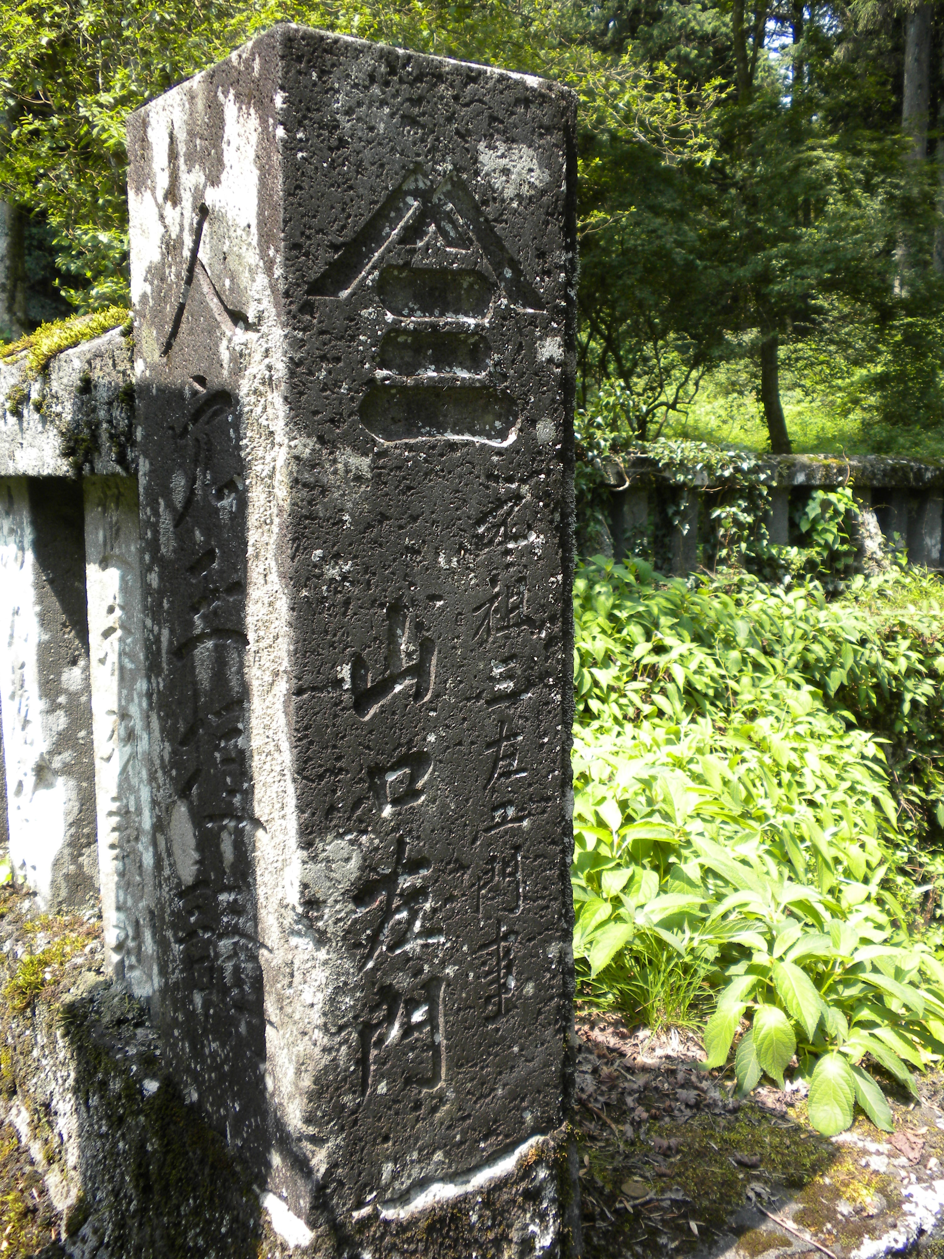 人穴富士講遺跡の富士講碑